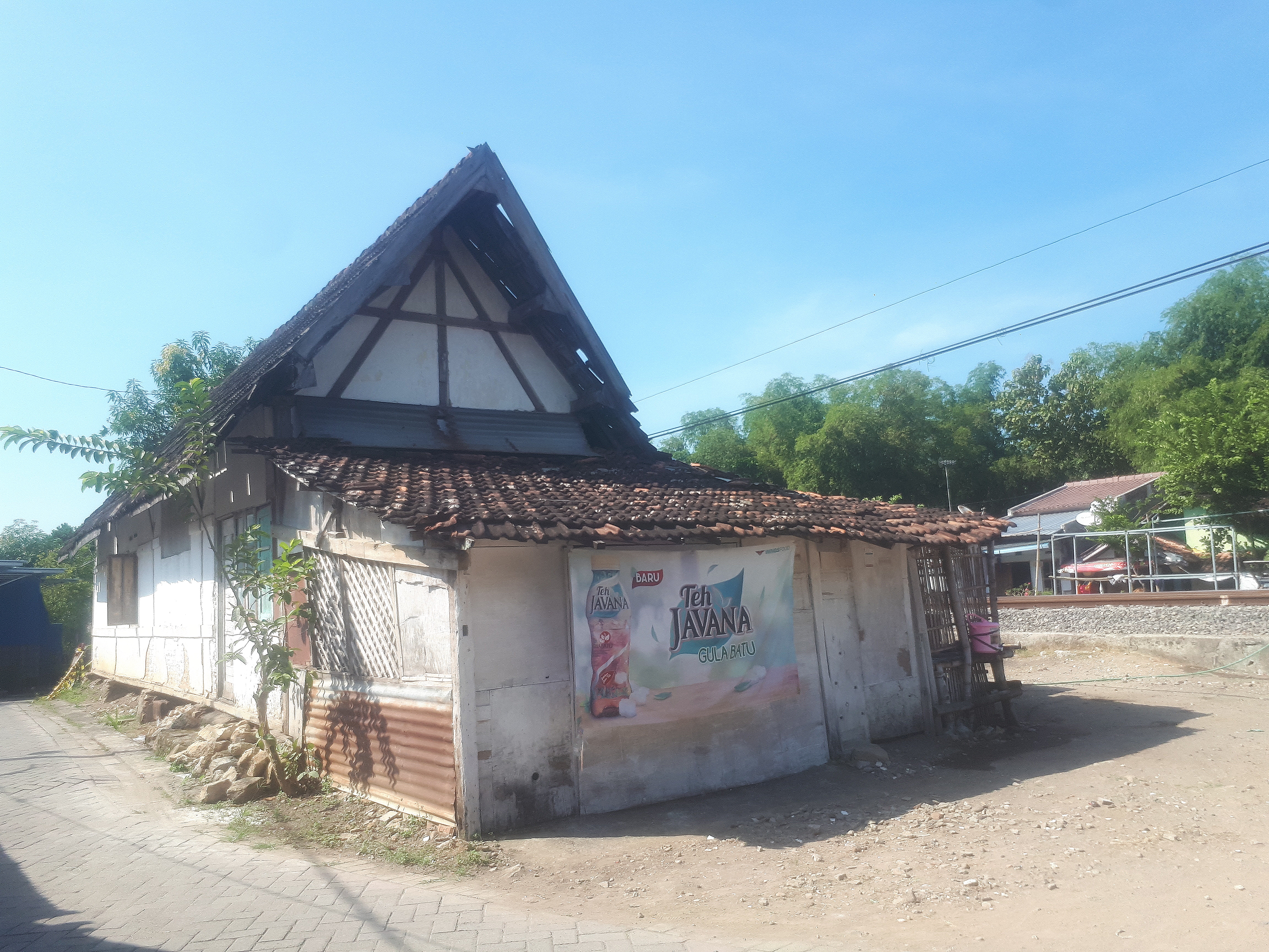 Tampak luar Halte Padangan, Bojonegoro, 2020